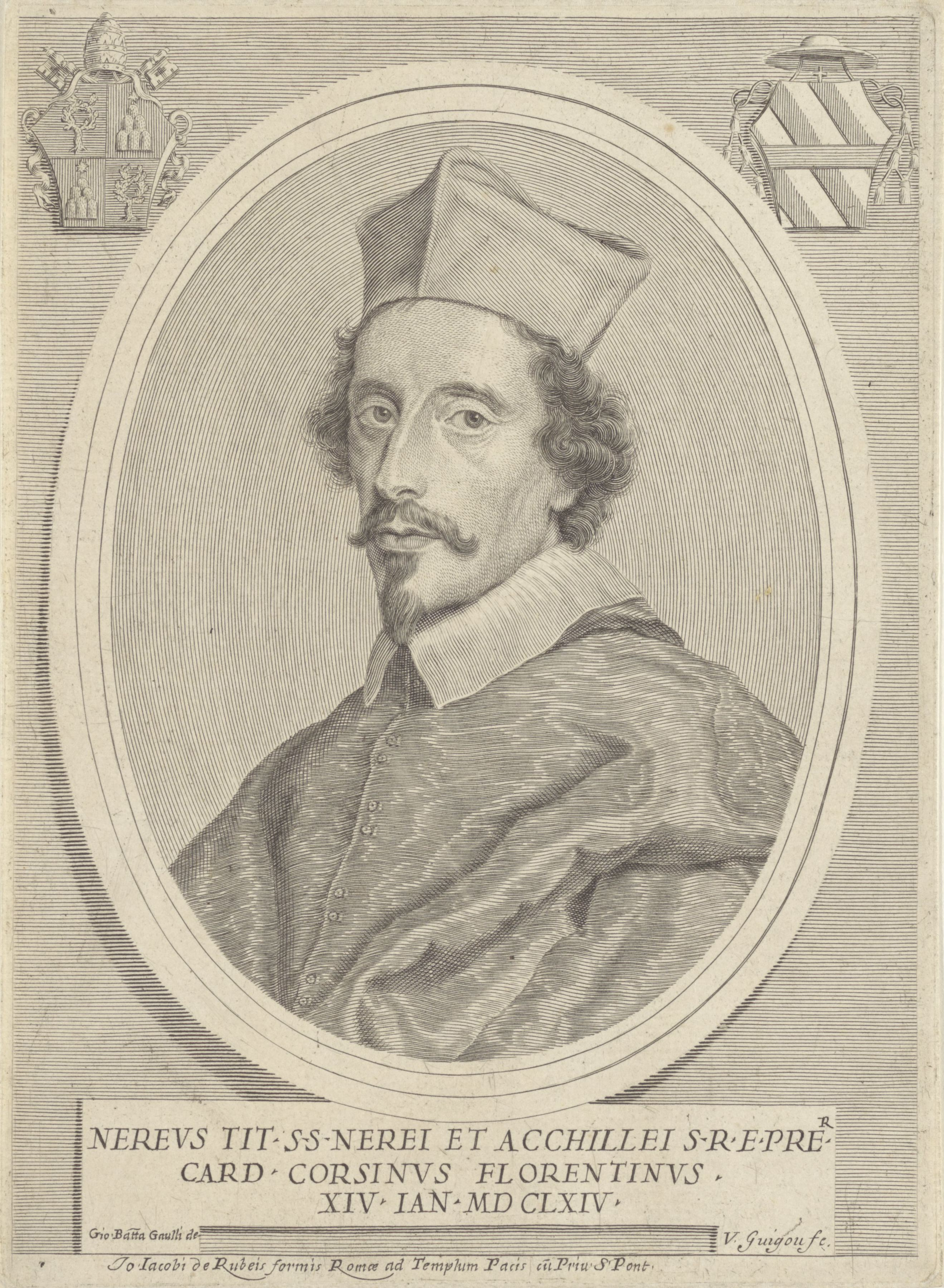 IdentificatieTitel(s): Portret van kardinaal Neri CorsiniPortretten van kardinalen met twee wapenschilden (serietitel)Effigies (serietitel)Objecttype: prent Objectnummer: RP-P-1909-5689Opschriften / Merken: verzamelaarsmerk, verso, gestempeld: Lugt 2228Omschrijving: Linksboven en rechtsboven een wapenschild.VervaardigingVervaardiger: prentmaker: V. Guigou (vermeld op object)naar tekening van: Giovanni Battista Gaulli (vermeld op object)uitgever: Giovanni Giacomo de'Rossi (vermeld op object)Plaats vervaardiging: prentmaker: Italiënaar tekening van: Italiëuitgever: RomeDatering: 1664 - 1961Fysieke kenmerken: gravureMateriaal: papier Techniek: graveren (drukprocedé)Afmetingen: plaatrand: h 192 mm × b 140 mmToelichtingPrent uit een reeks van onbekende omvang met portretten van kardinalen. De prenten werden vanaf 1657 vervaardigd in opdracht van uitgever Giovanni Giacomo de’ Rossi, Waar: na de productie werd voortgezet onder leiding van zijn opvolgers Domenico de’ Rossi en Lorenzo Filippo de’ Rossi, en tenslotte onder leiding van de Calcographia R.C.A.OnderwerpWat: historical personscardinalWie: Neri CorsiniVerwerving en rechtenVerwerving: aankoop 1905Copyright: Publiek domein